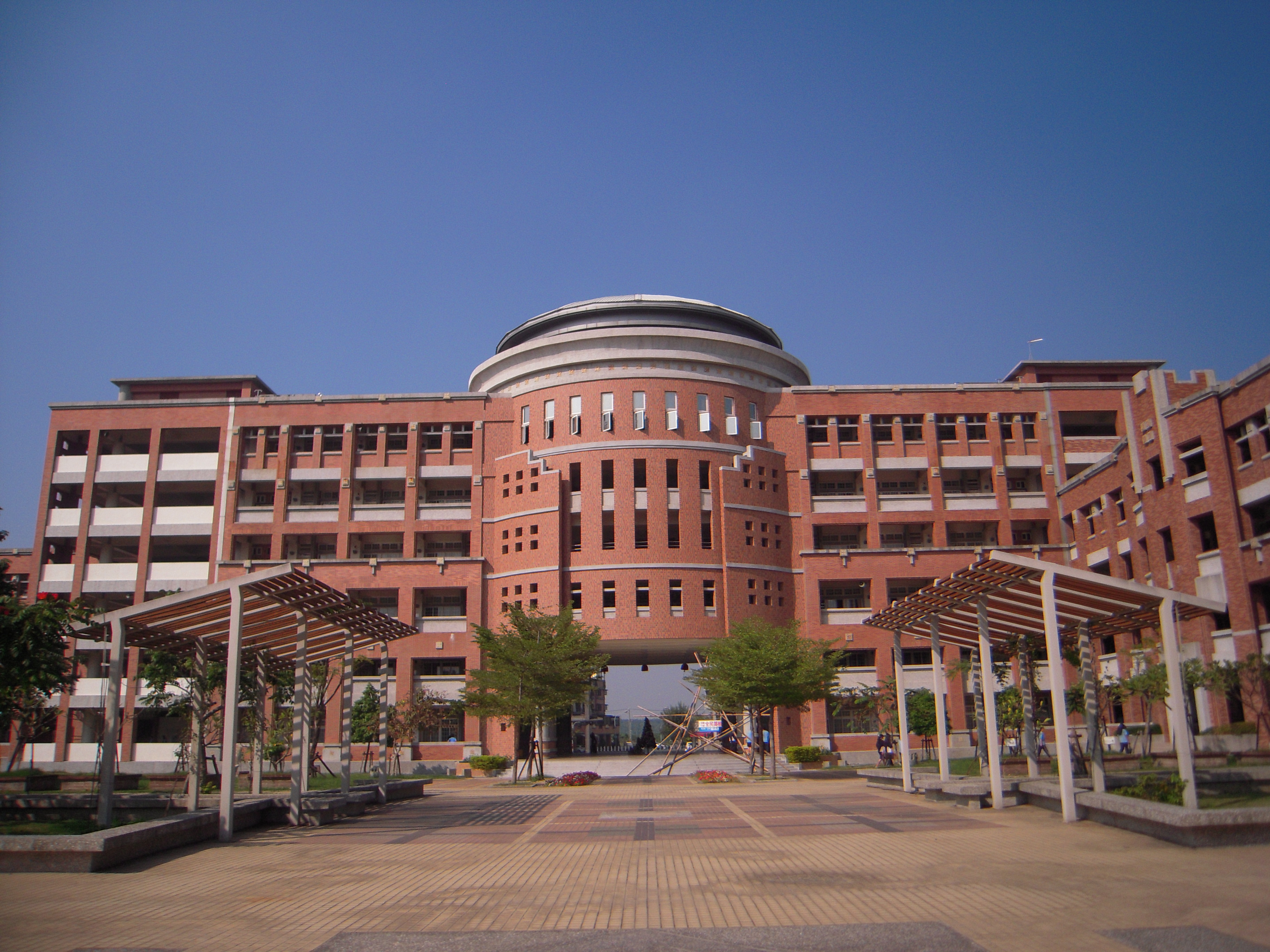 NTHS SCHOOL